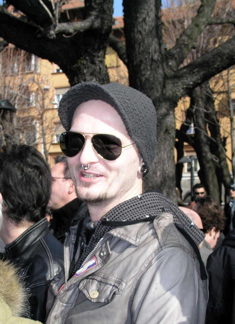 "Riječki novi val" ispred Konta u Rijeci, Damir Urban, Hrvatska